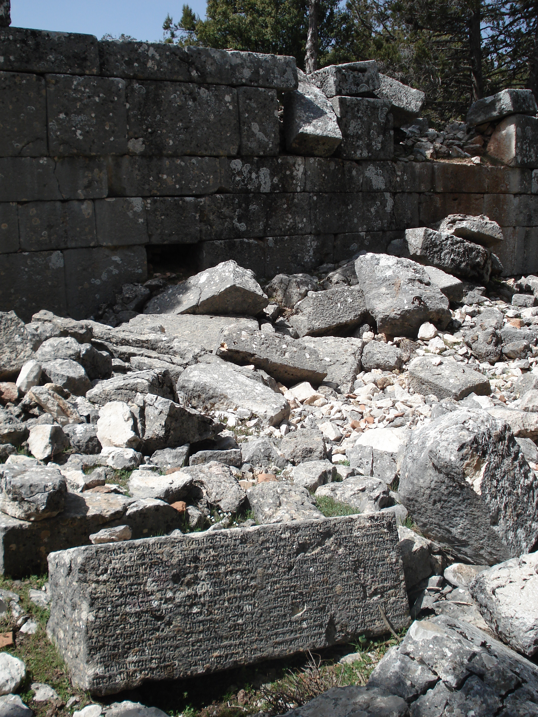 A Fragment of the Diogenes Inscription at Oinoanda